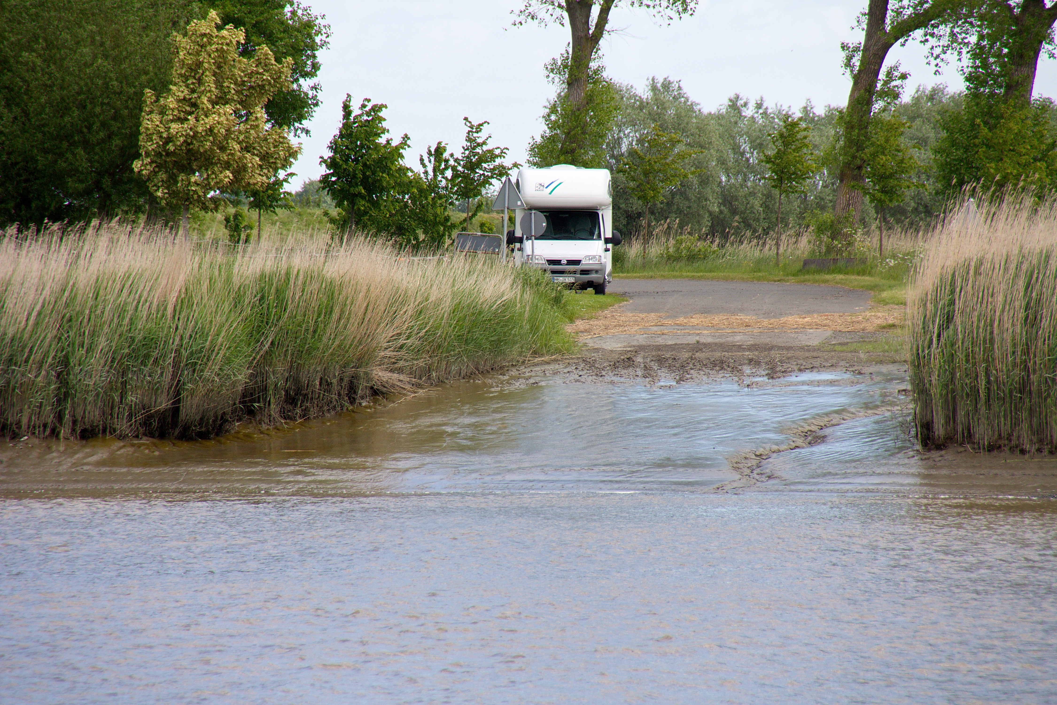 Oste in Geversdorf, Niedersachsen, Deutschland